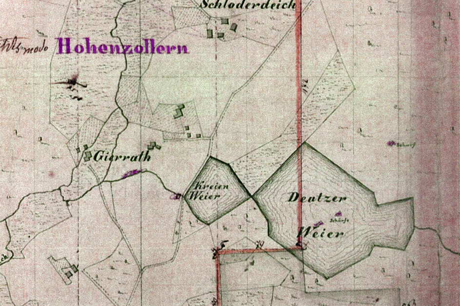 Auszug aus dem Verleihungsriss der Gruben Franconia, Hohenzollern und Habsburg